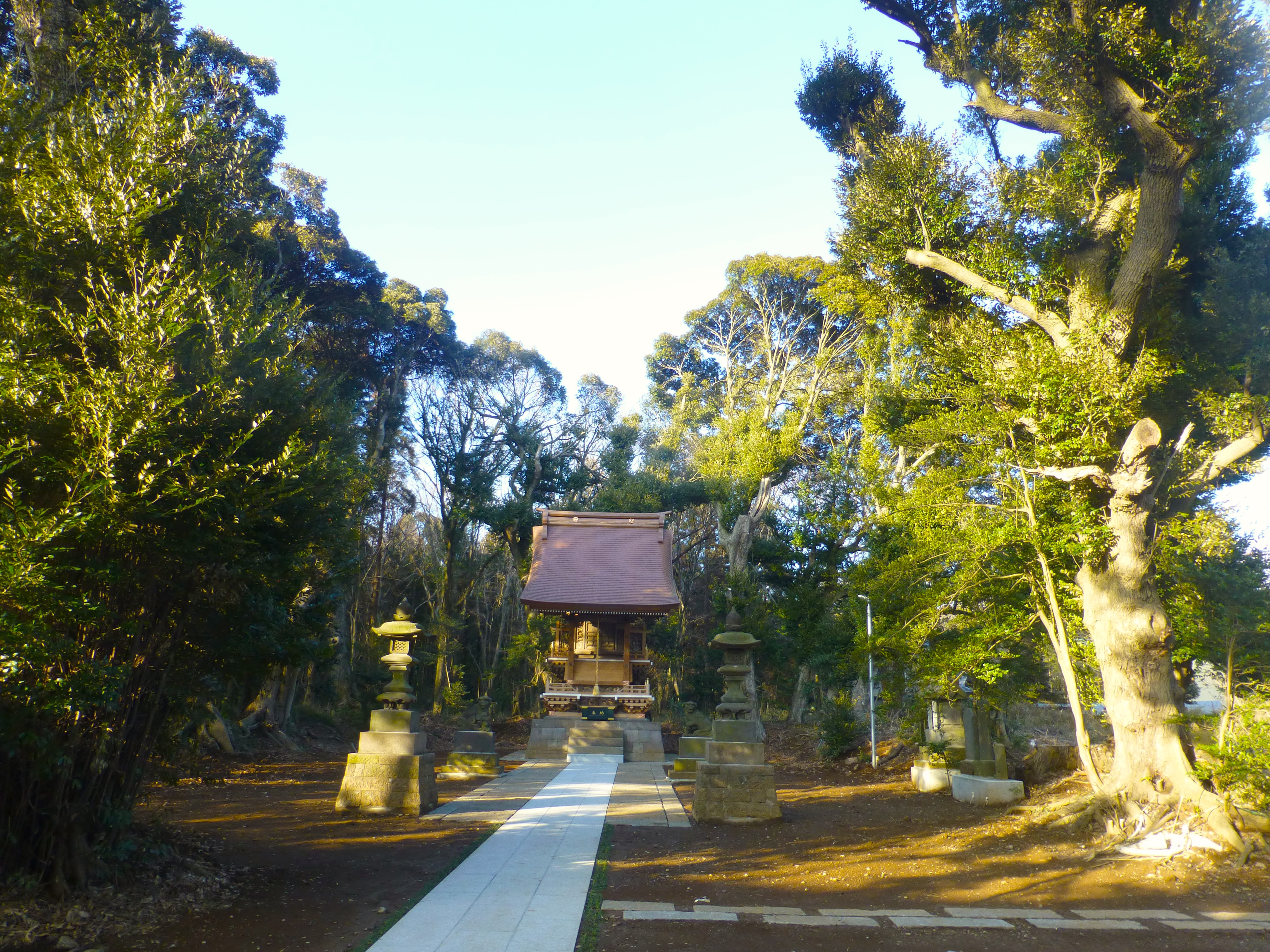 宗像神社(むなかたじんじゃ)は千葉県白井市清戸に存在する神社である。(Munakata-jinja is a Shinto shrine in Shiroi, Chiba)